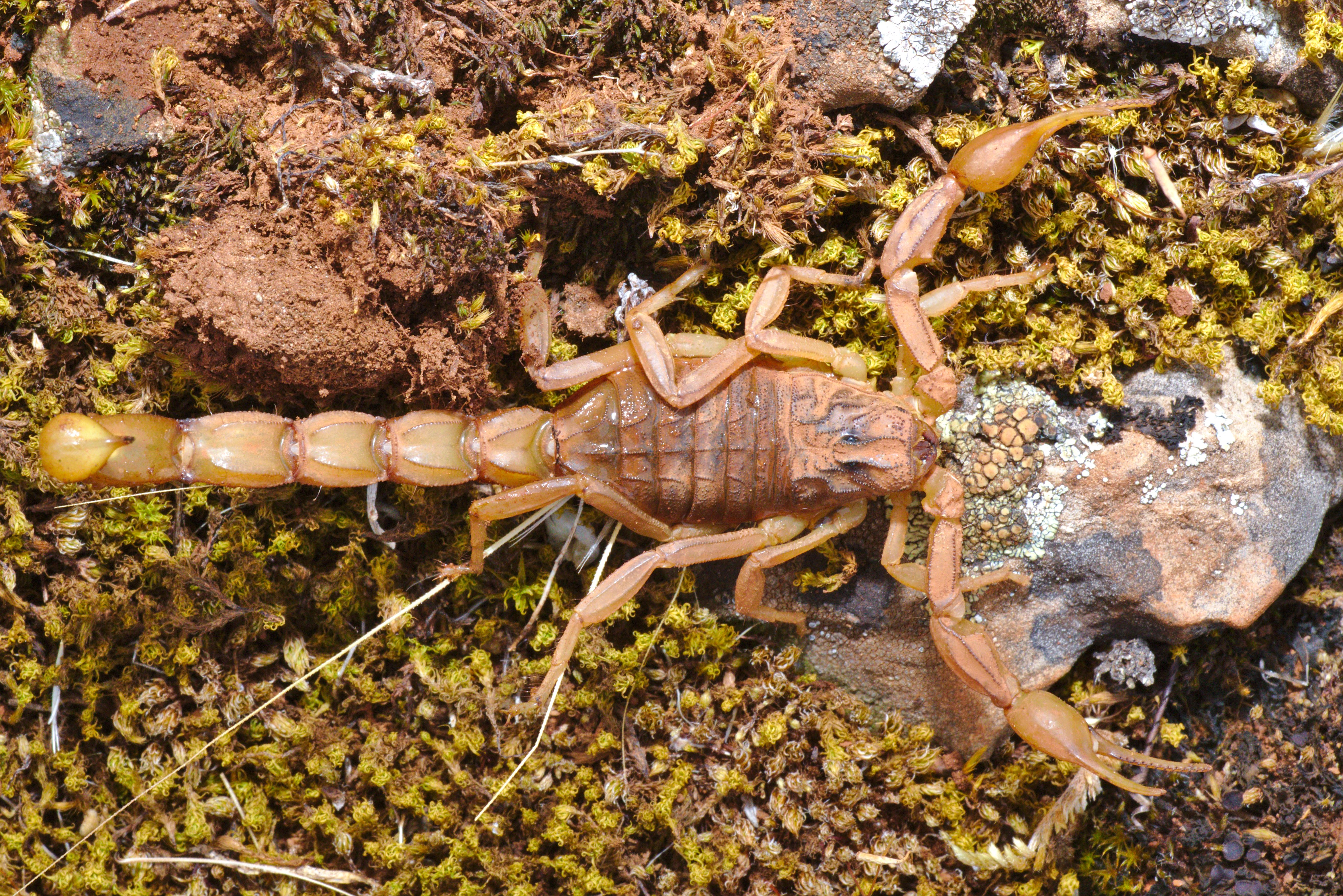 El alacrán ibérico (Buthus ibericus) fotografiado dorsalmente en las proximidades de la Cueva de Santa Ana, dentro de las instalaciones del CEFOT nº1 de Cáceres (Extremadura).